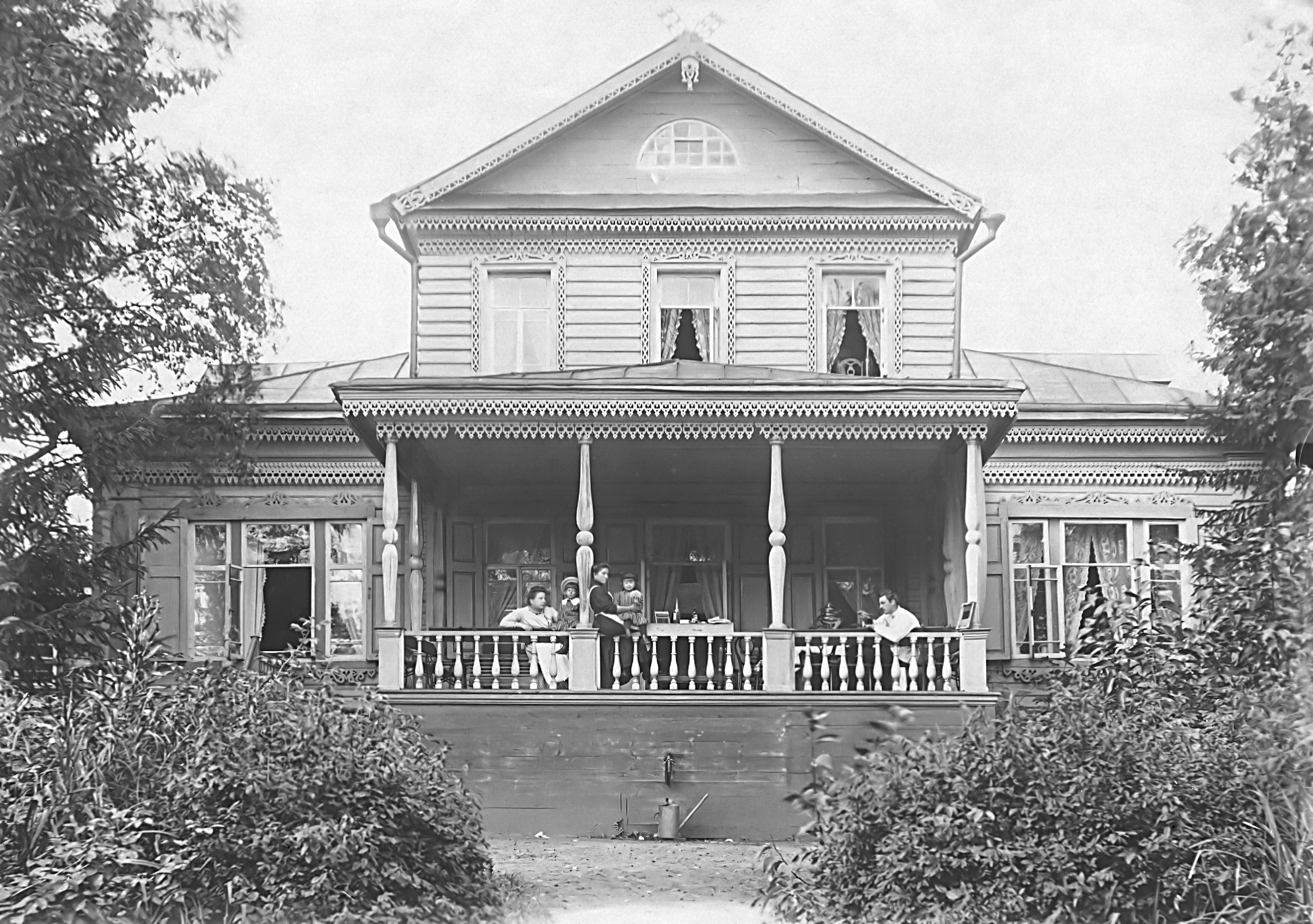 Веранда усадебного дома Ганшиных в Горках Переславских